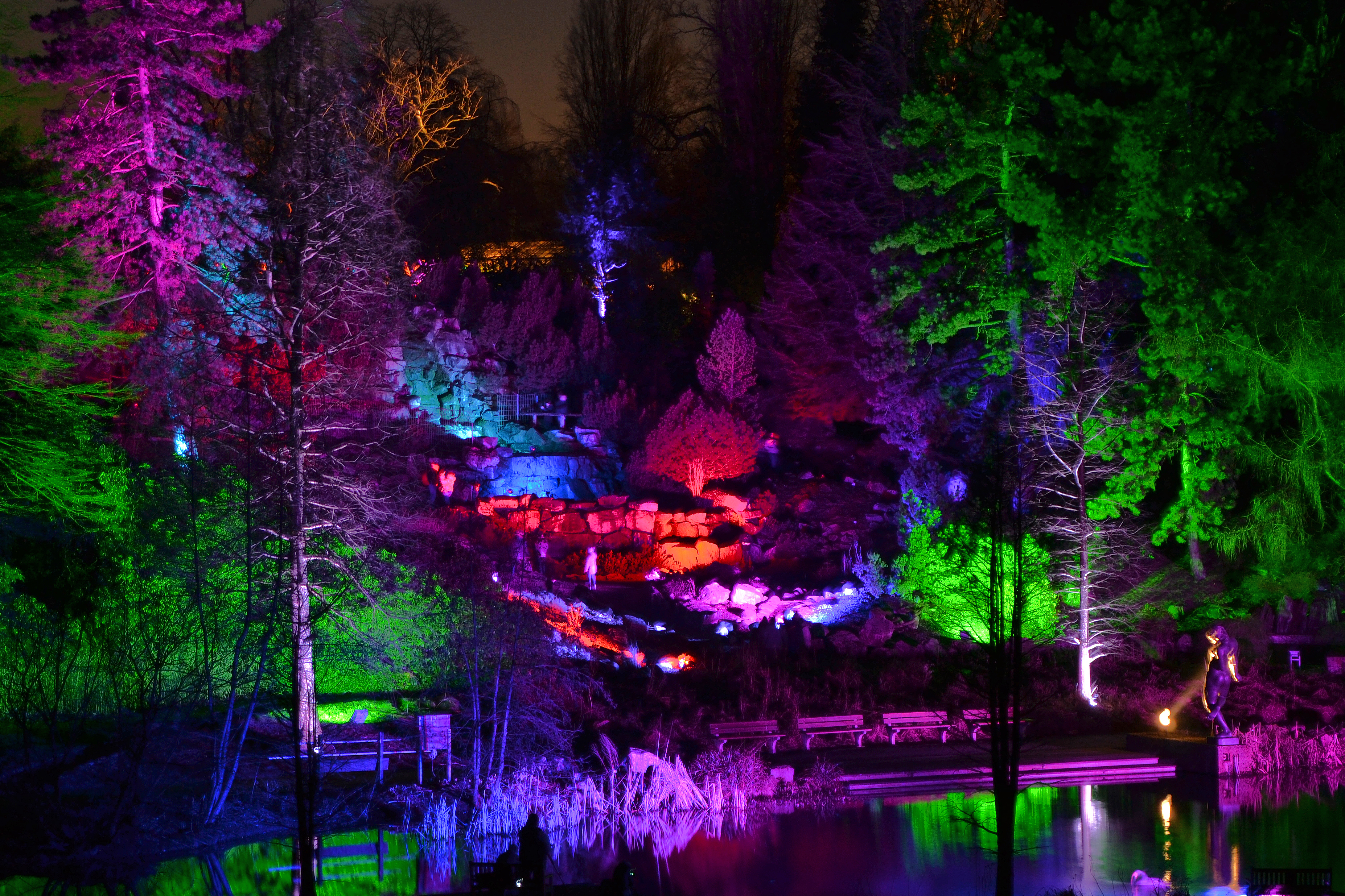 Parkleuchten 2015, Essen, Grugapark